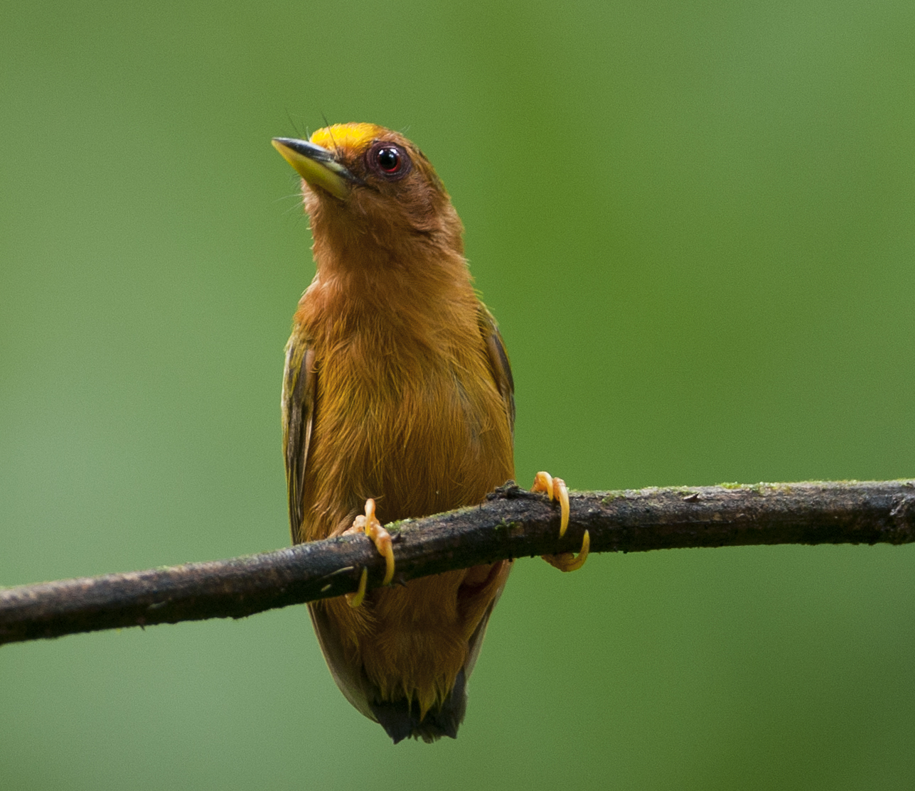 Si Phang Nga N.P. - Thailand